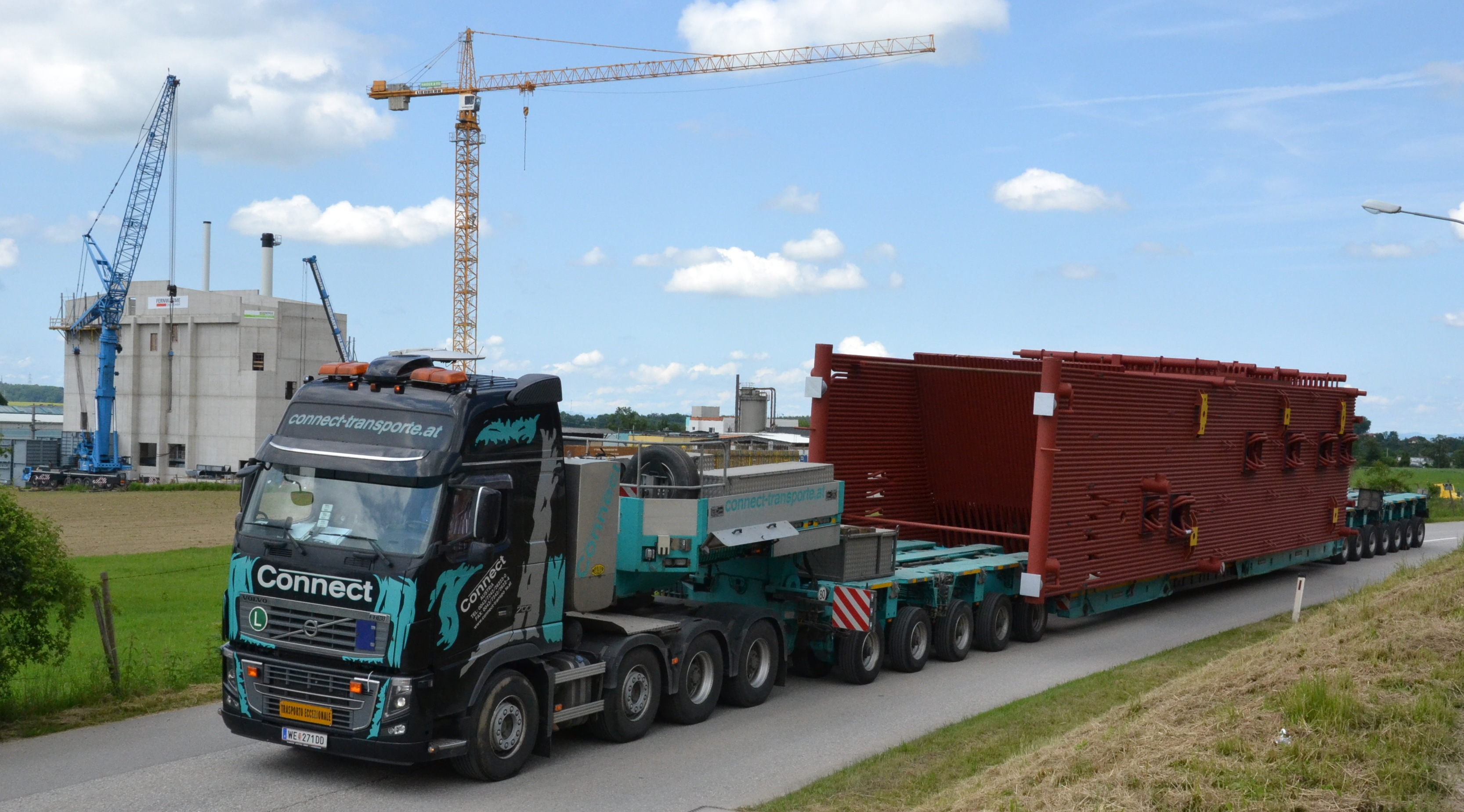 Anlieferung des Biomassekessel für das Biomasseheizkraftwerk Steyr. Max. 108 bar und 545°C.